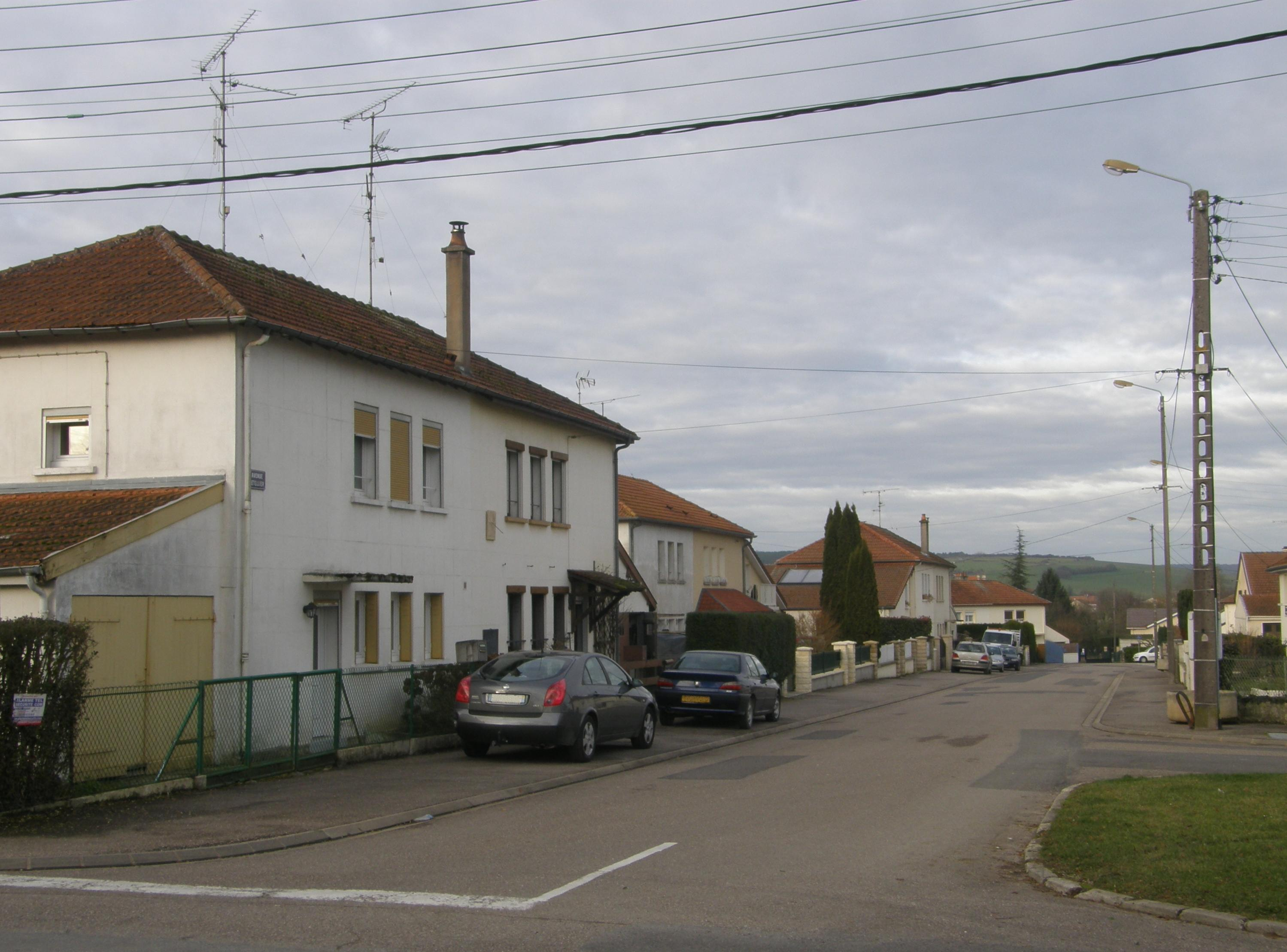 Thierville. Vue de l'avenue Letellier depuis la rue du 15ème Régiment de Chasseurs.